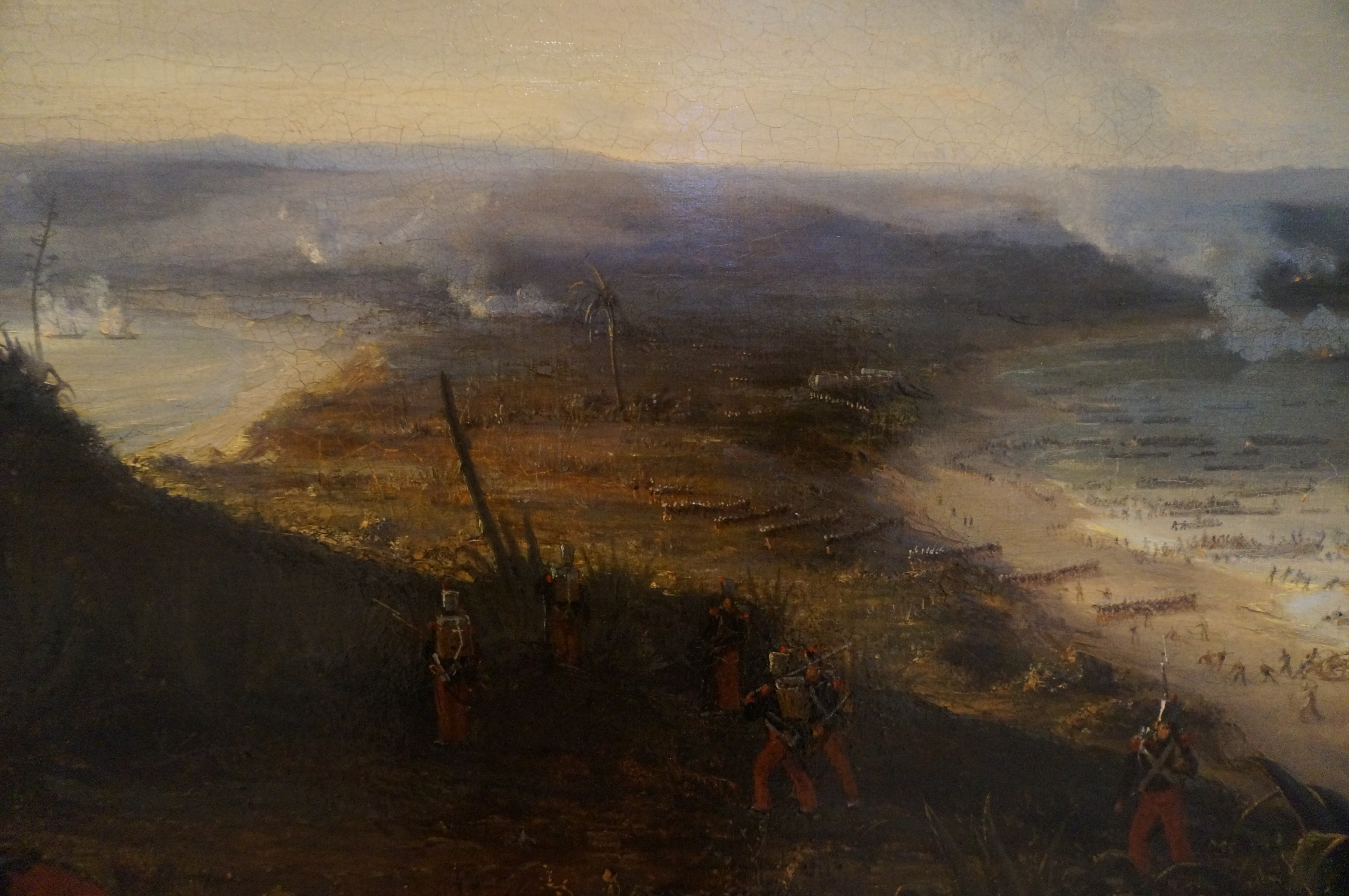 le débarquement à Sidi-Feruch